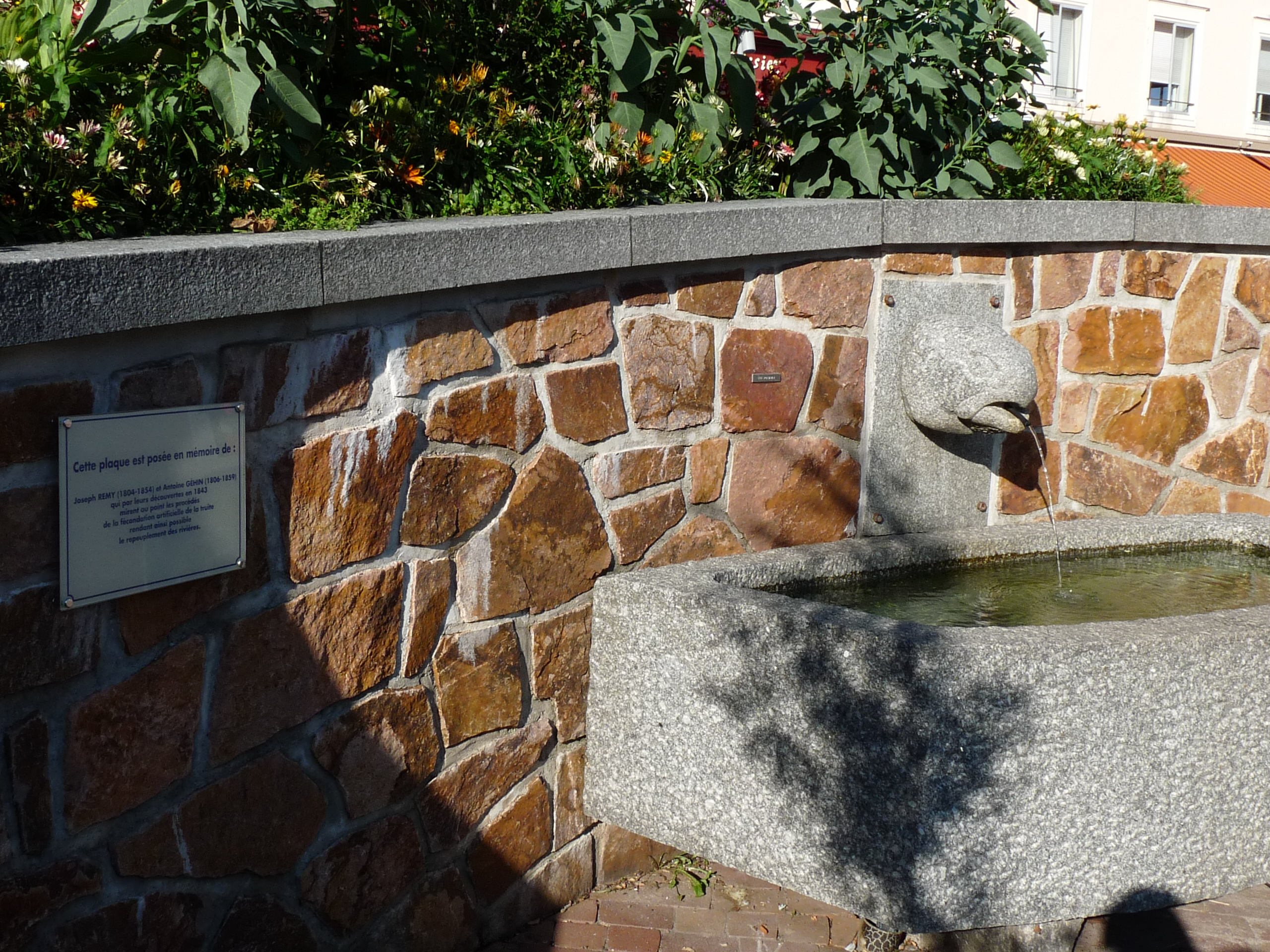 Plaque commémorative place du Champtel La Bresse